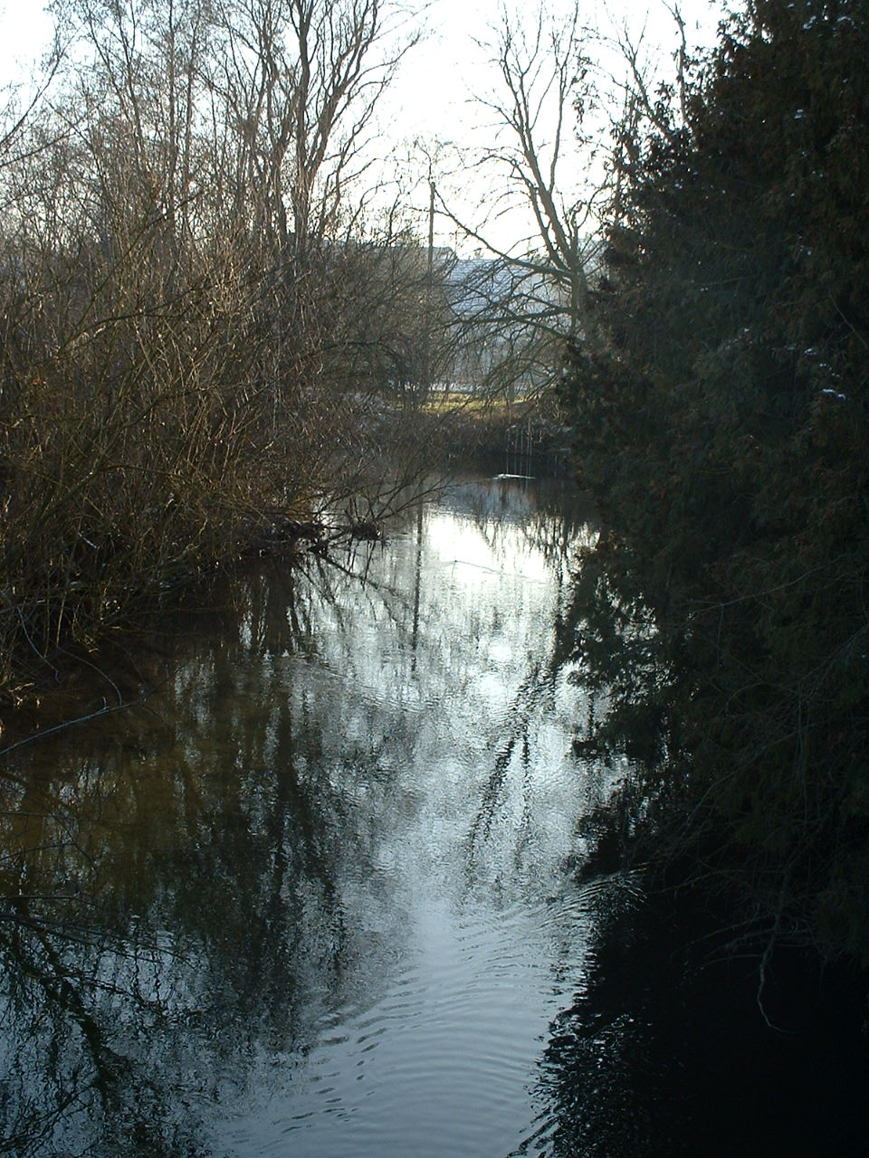 River Rot near Achstetten